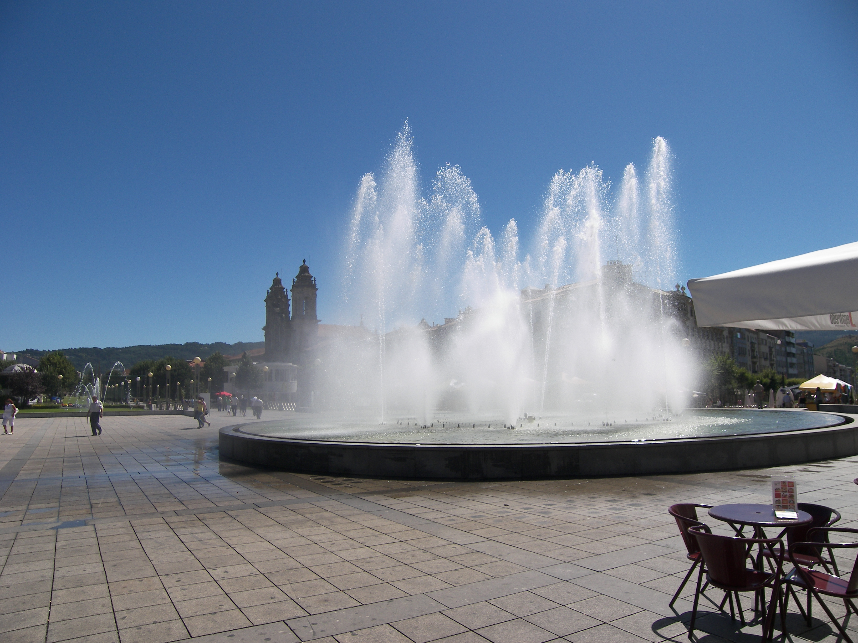 Braga - Praça da República, im HG die beiden Türme der Igreja dos Congregados